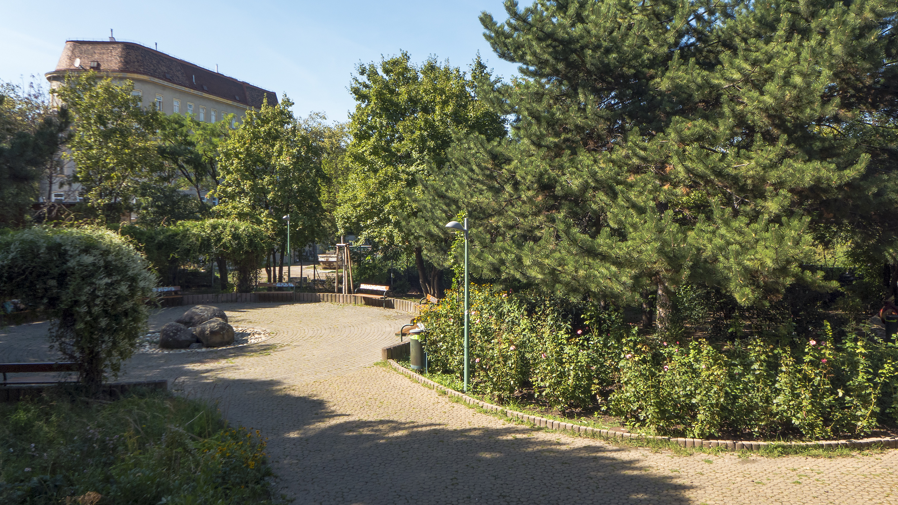 Alois-Greb-Park in Wien 10